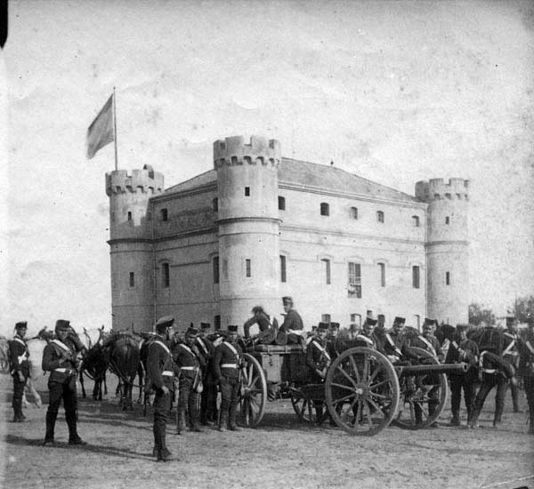 Castell del Camp de la Bota (Barcelona-Catalunya). 1858. Desaparegut als anys 60.